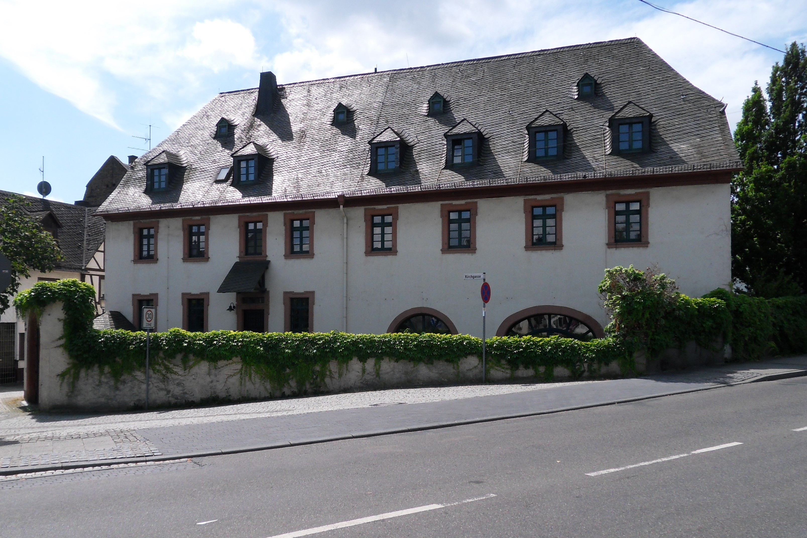 Katholischer Pfarrhof in Niederwalluf, 1729 für eine örtliche Niederlassung des Mainzer Jesuitenkollegiums erbaut